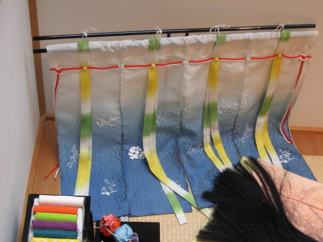 Kicho ,几帳